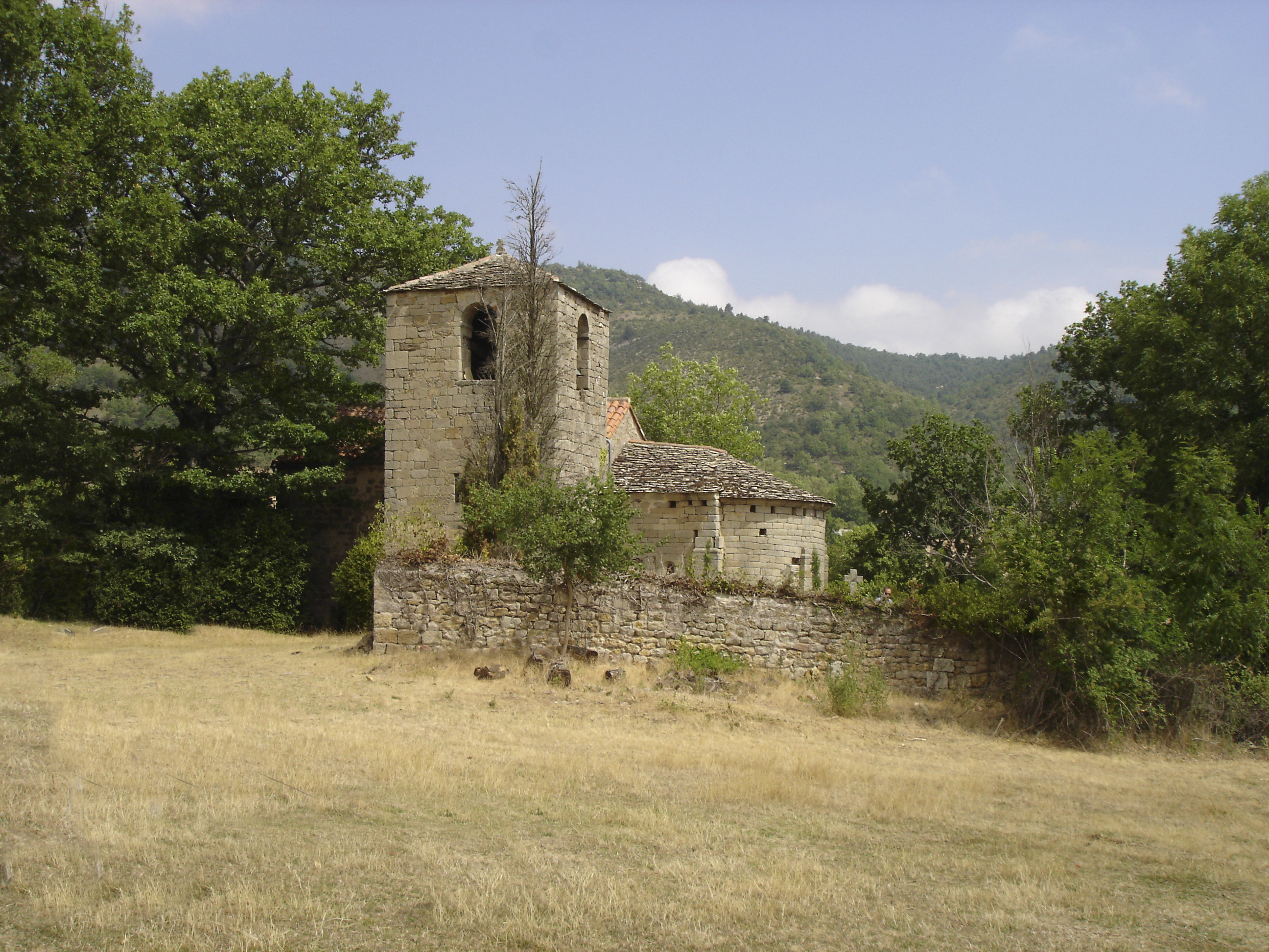 Chapelle romane de Marnhargues-et-Latour (Aveyron)